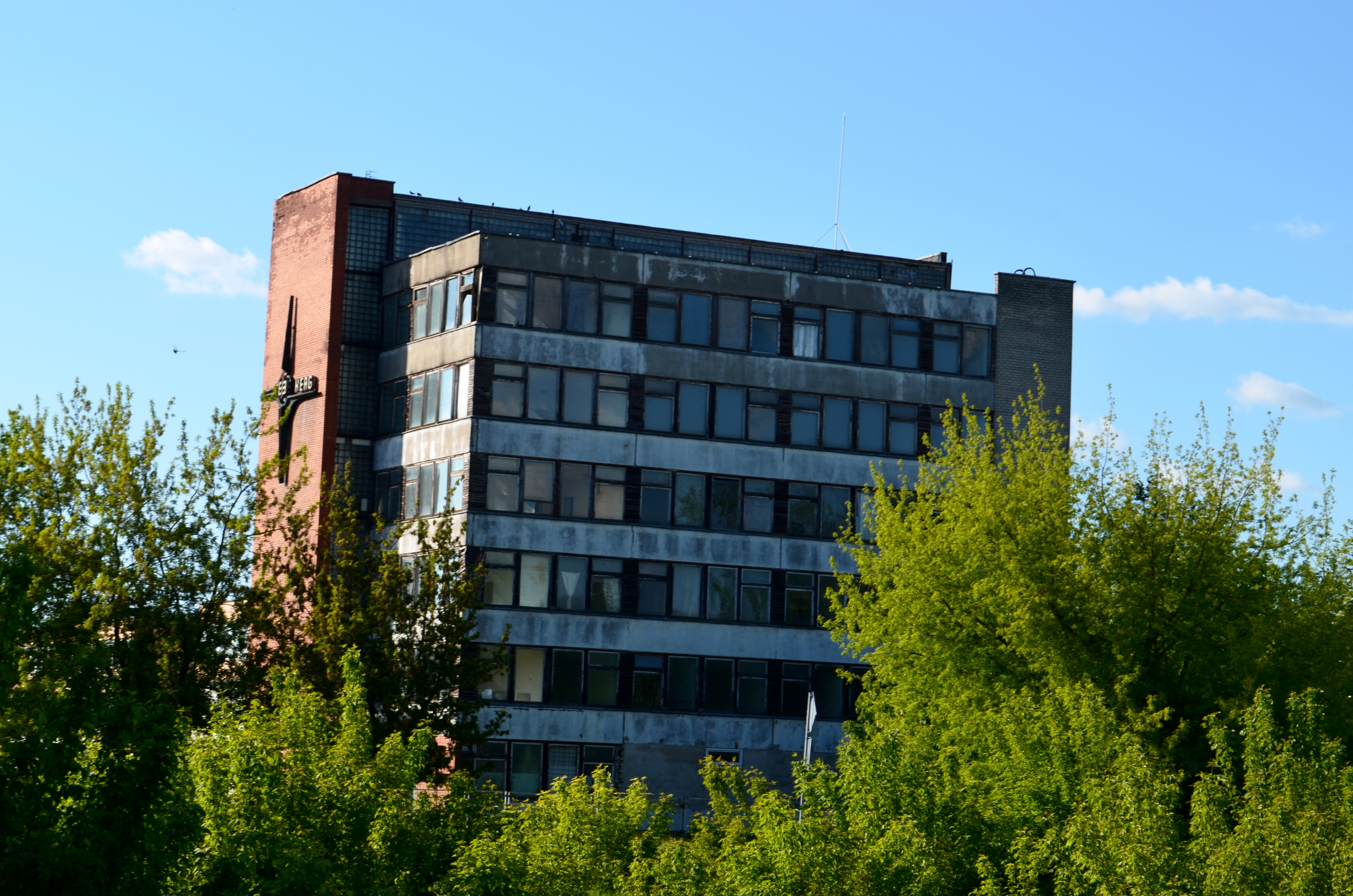 Kėdainių Elektros aparatūros gamykla (EAG)